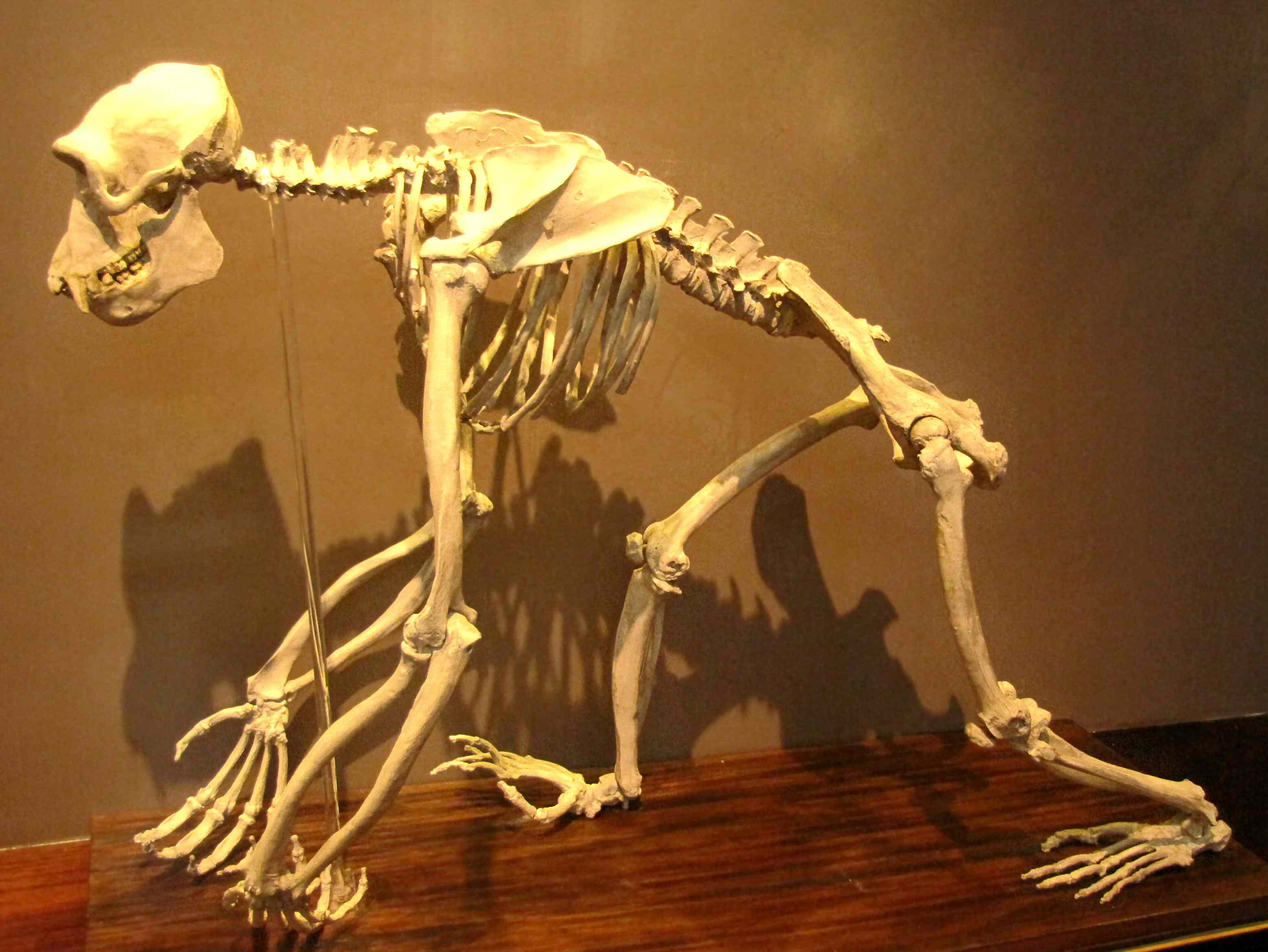 Pan Troglodites. Chimpancé. Museo de Ciencias Naturales de La Plata.